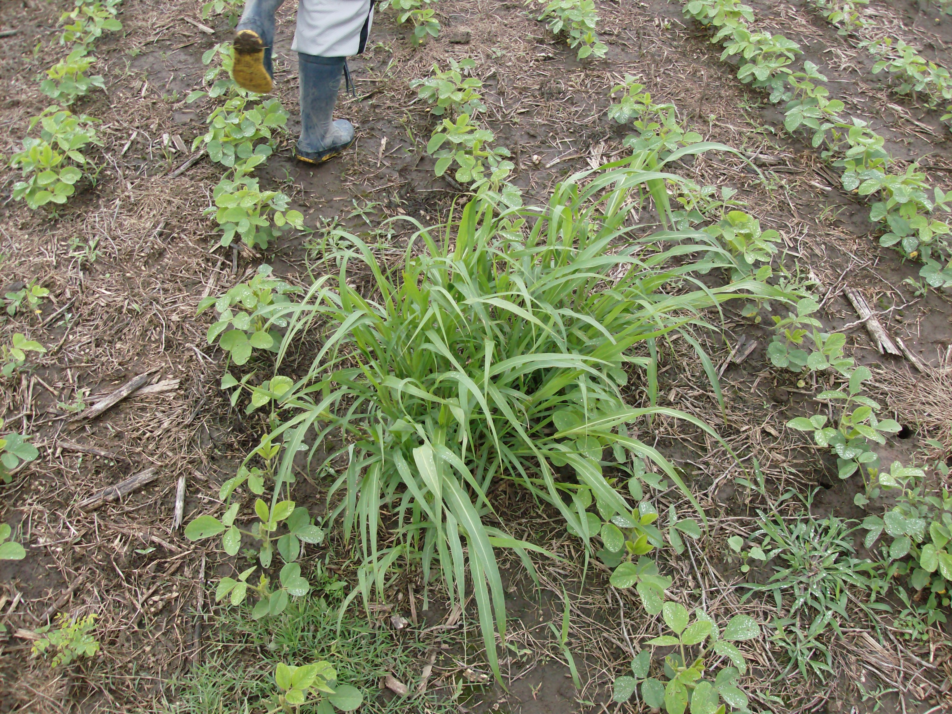 En la imagén se observa la presencia de la maleza Sorgo de Alepo en un cultivo de Soja en la Pampa Argentina.